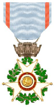 Orde van het Kruis van Juli, Frankrijk, 1830